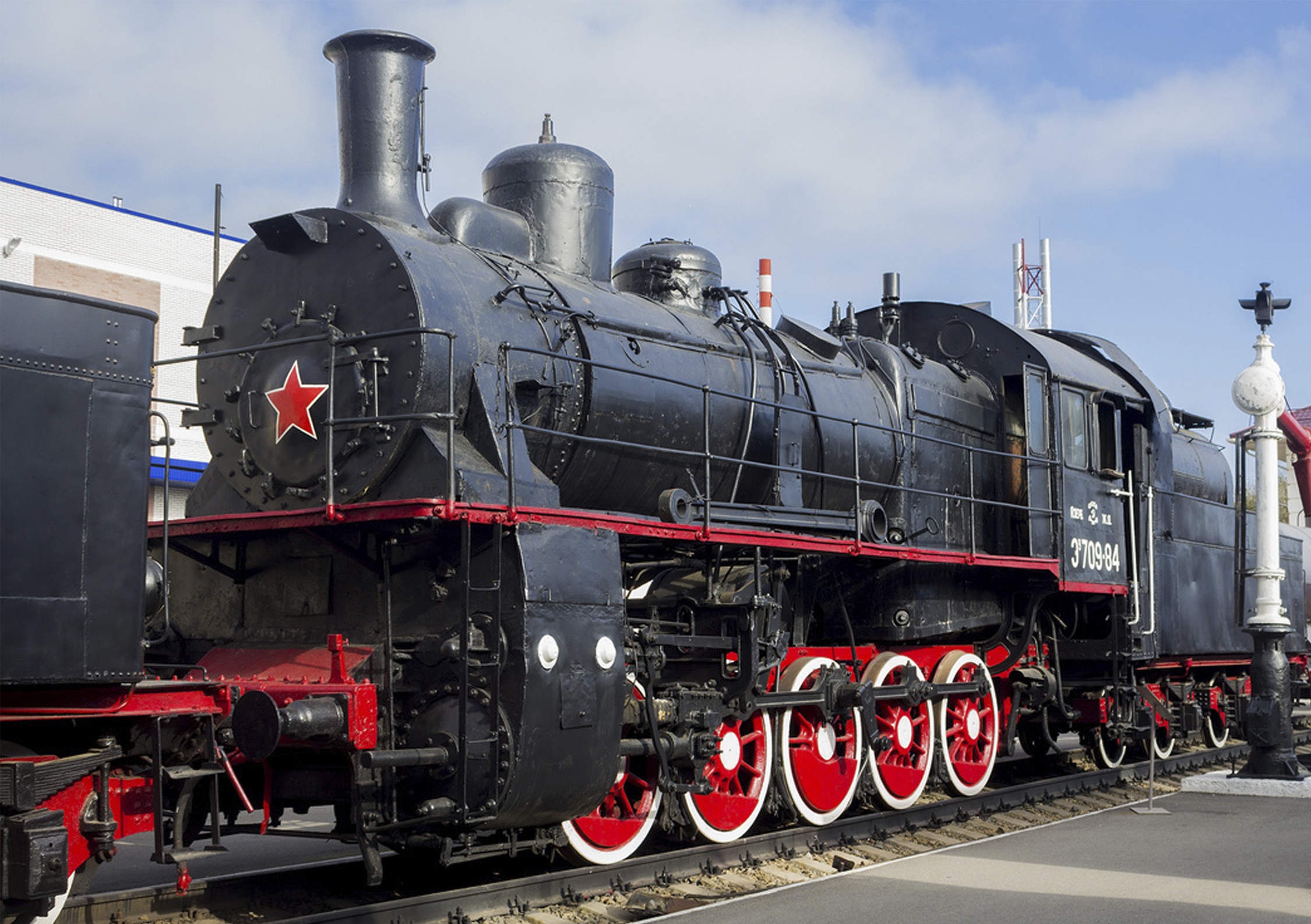 Паровоз построен в 1930 году Луганским паровозостроительным заводом